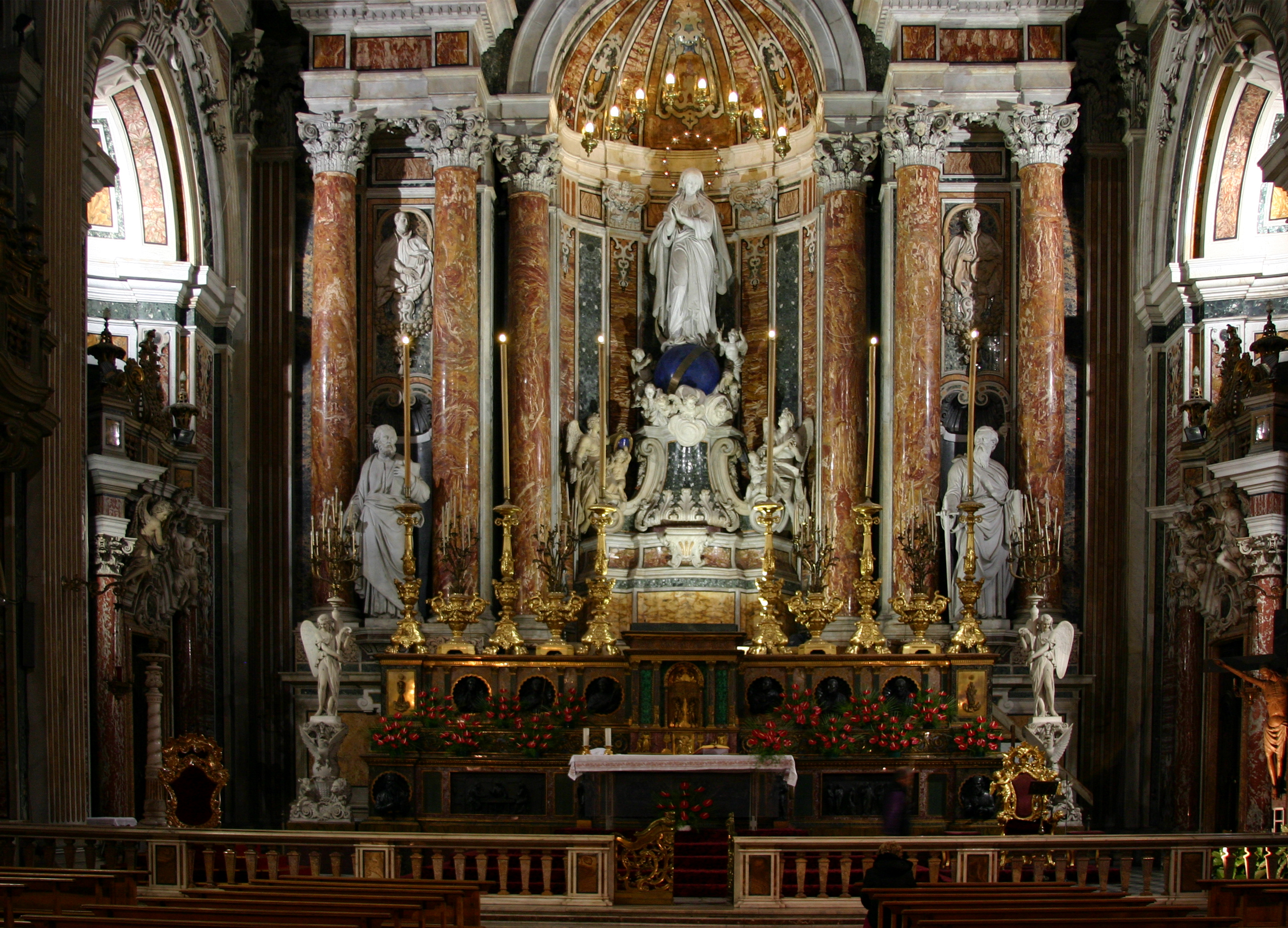 Gesù Nuovo - Naples